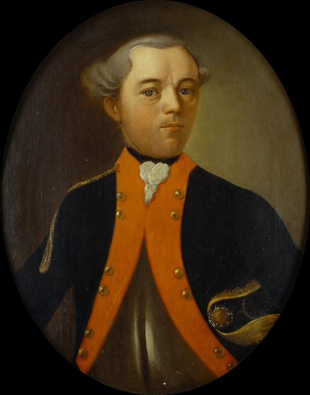 Johann Caspar Schiller als Leutnant im Alter von etwa 35 Jahren. Laut: Walter Hoyer (Hrsg.): Schillers Leben dokumentarisch. Kiepenheuer & Witsch, Köln/Berlin 1967, S. 850.